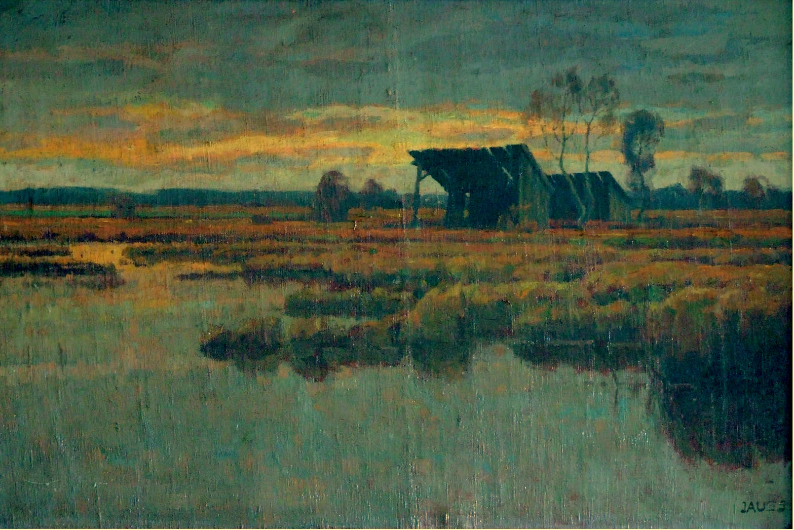 Öl auf Leinwand 67 x 100 cm